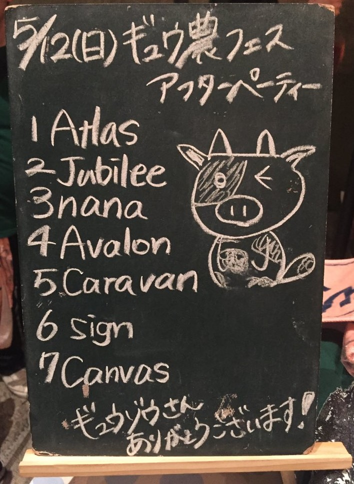 amiinAセトリボード